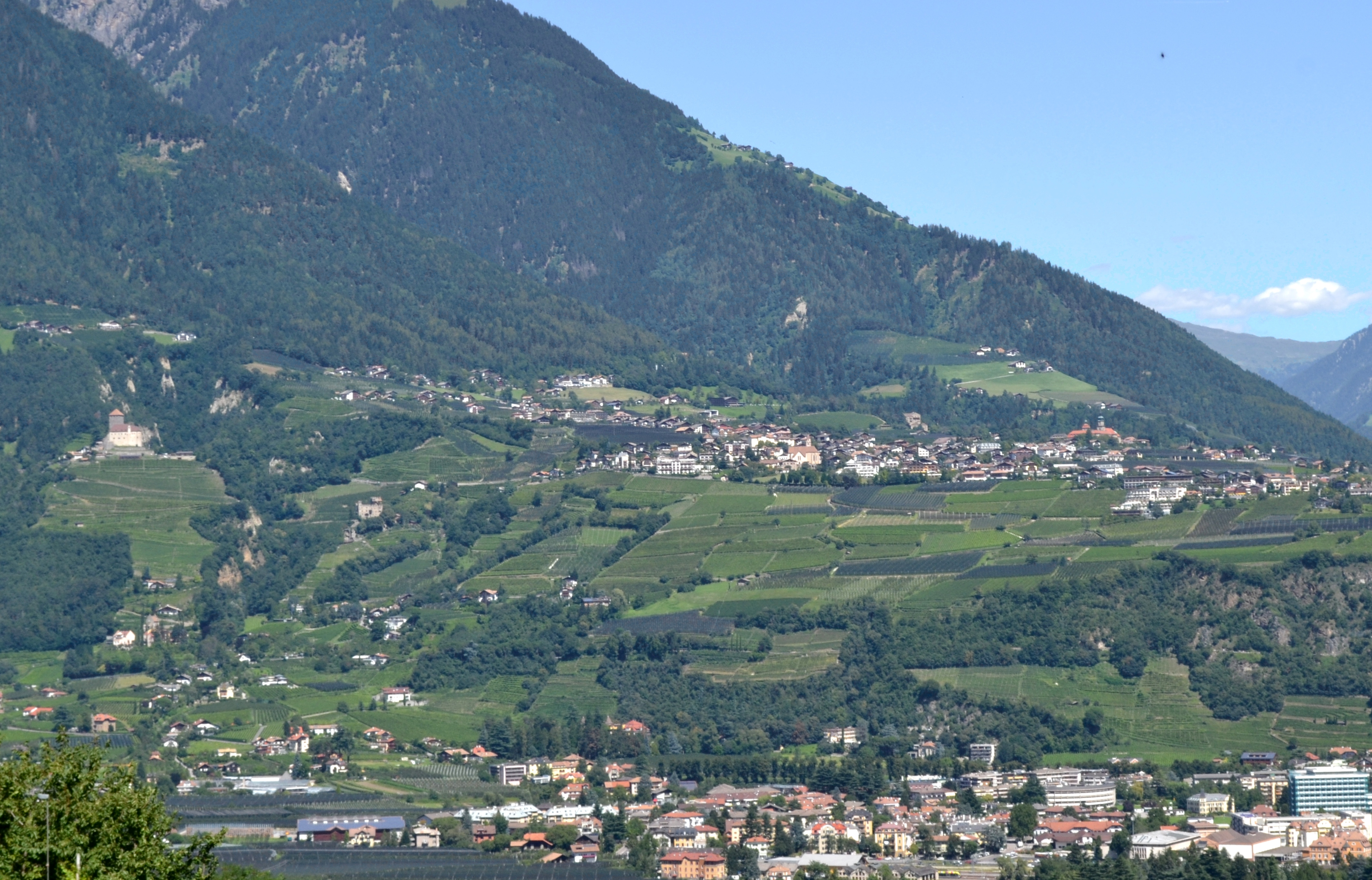 Dorf Tirol oberhalb von Meran